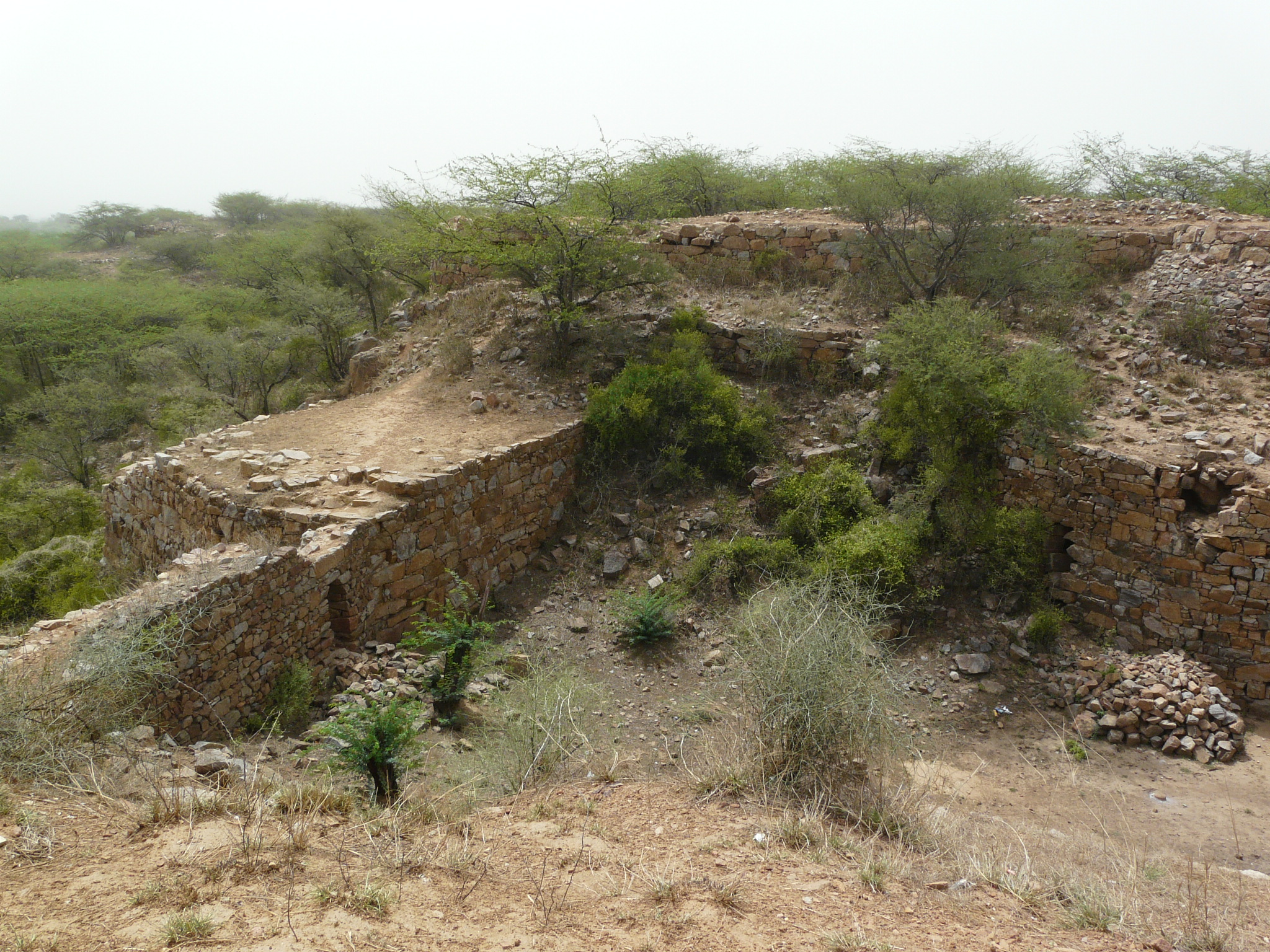 Lal Kot walls Lal Kot